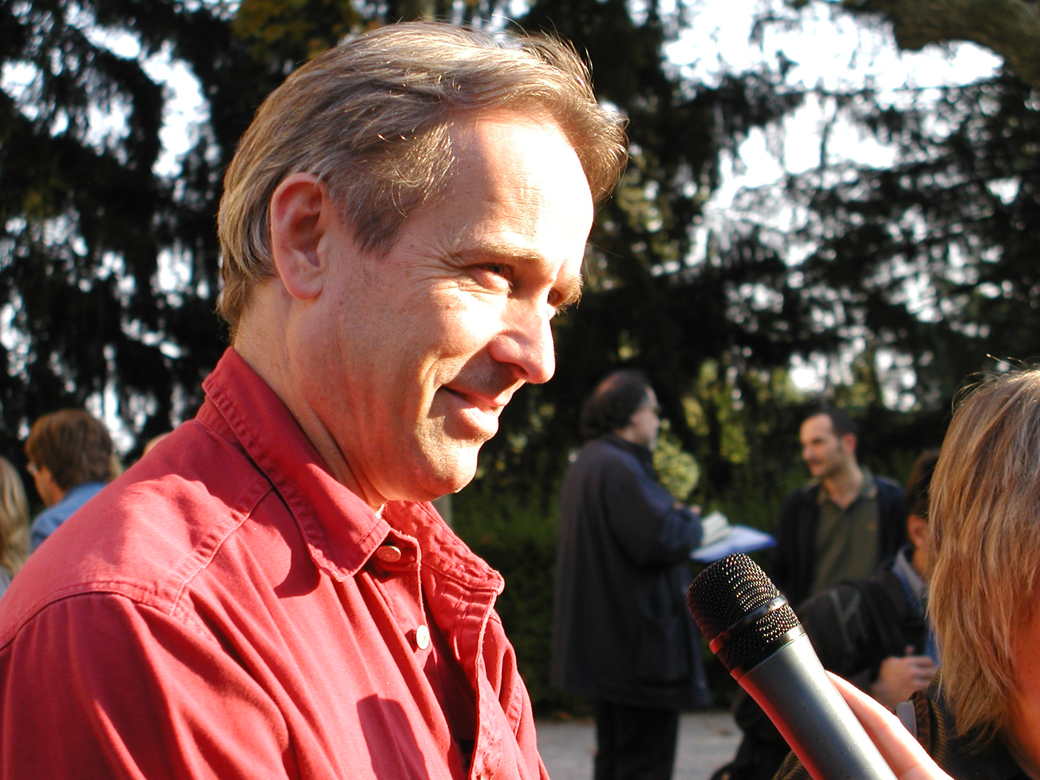 Fotografia dell'autore Jasper Fforde scattata dall'utente con il consenso della persona ritratta.